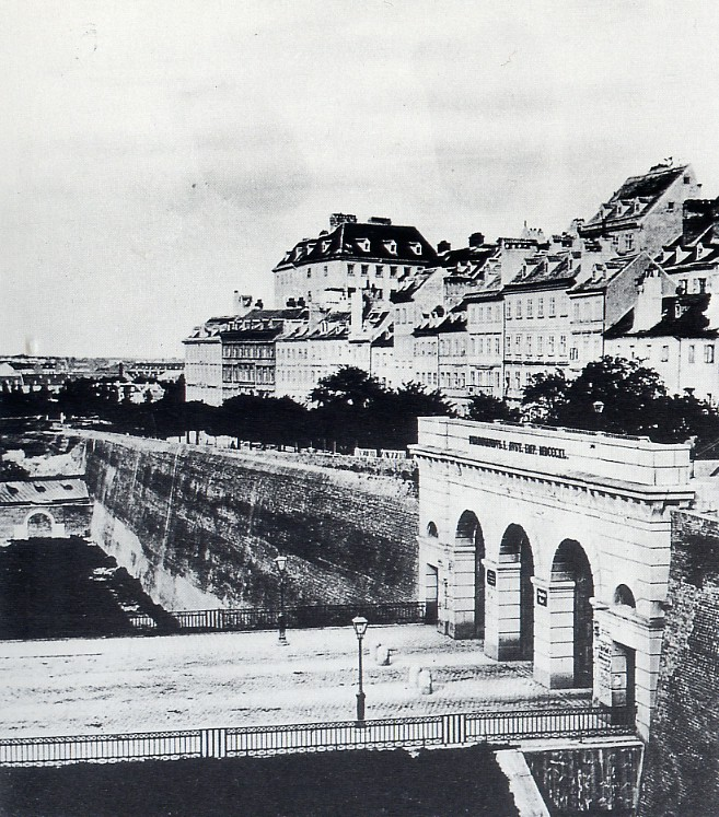 Schottentor in Vienna in 1860.